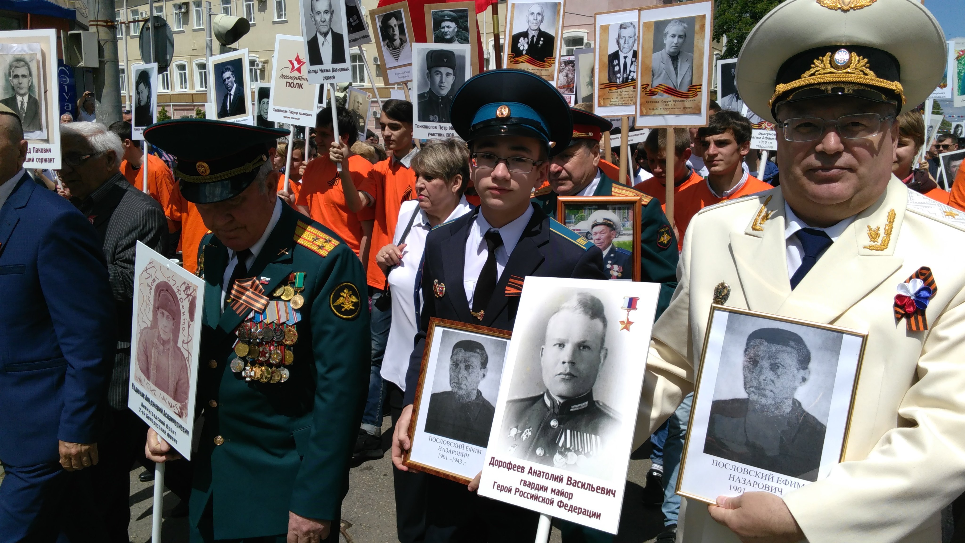 Бессмертный полк в Майкопе 2016. Пословские отец и сын в День Победы в Майкопе